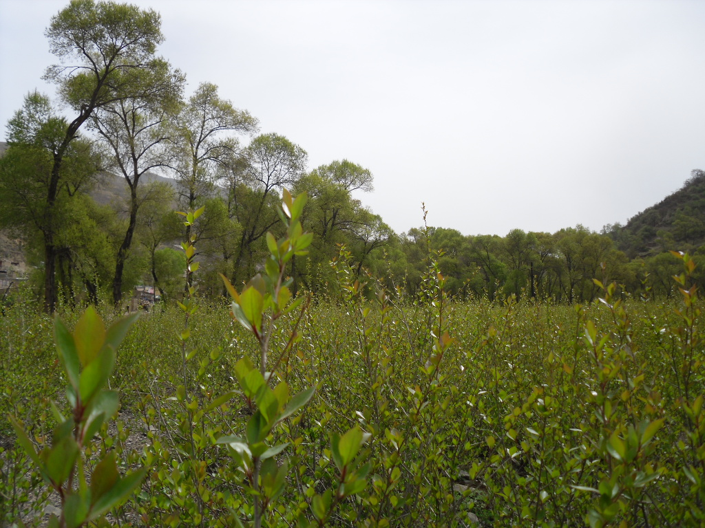 岷县 杨树苗